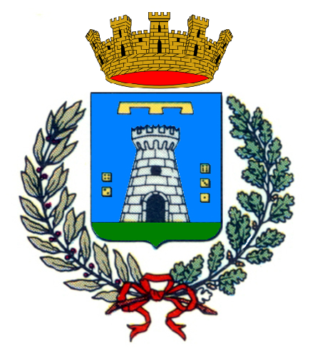 Stemma di conversano dopo la sua elevazione al titolo di "città", voluto dal presidente Giorgio Napolitano.